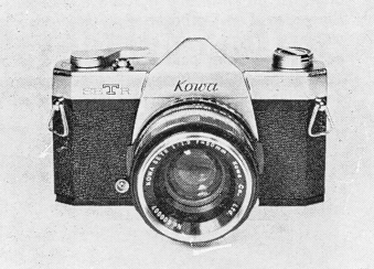 Boîtier reflex Kowa SETR